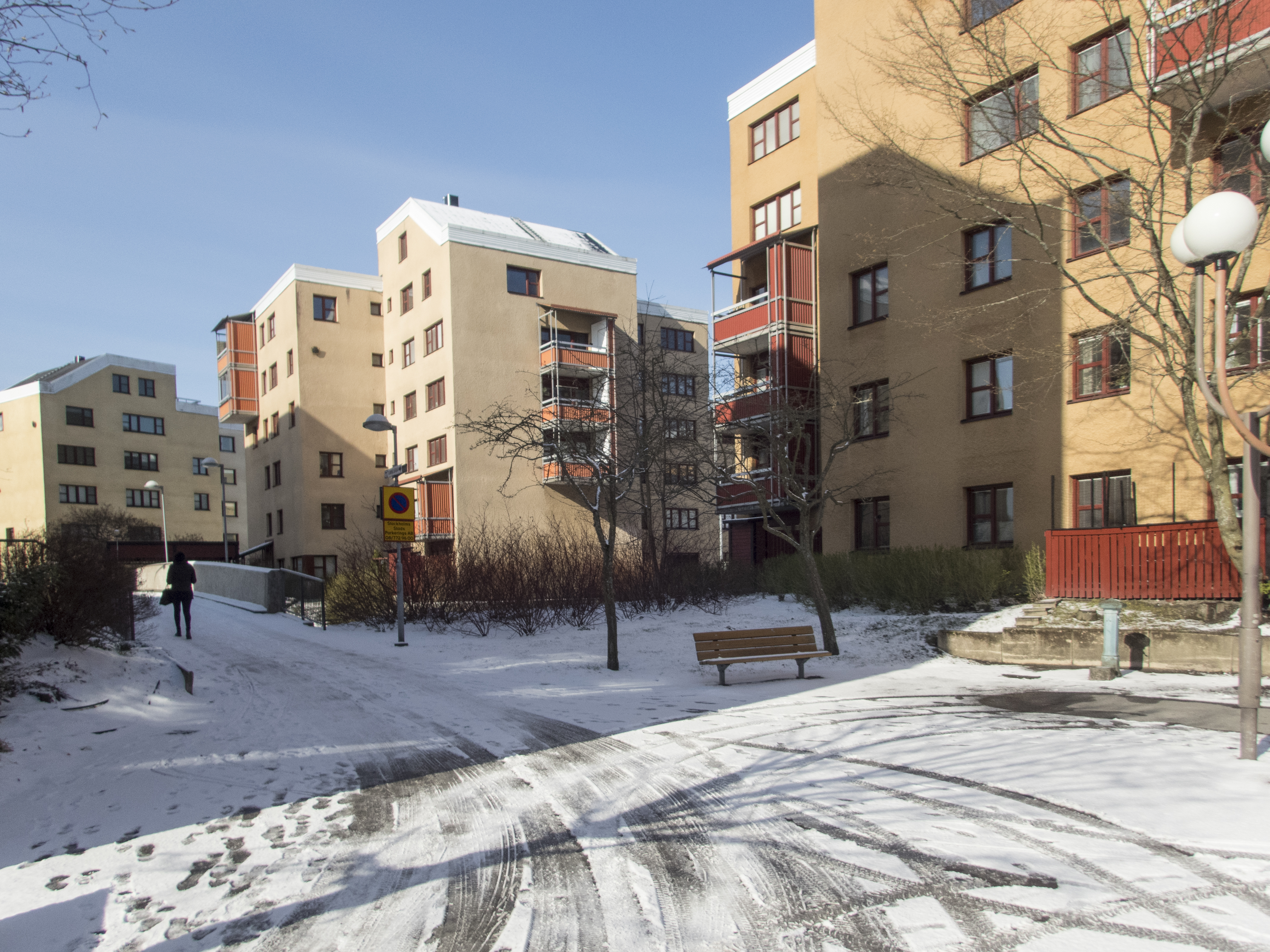 Kista flerbostadsområde. Byggnadsår 1974-1980. Arkitekter Höjer & Ljungqvist